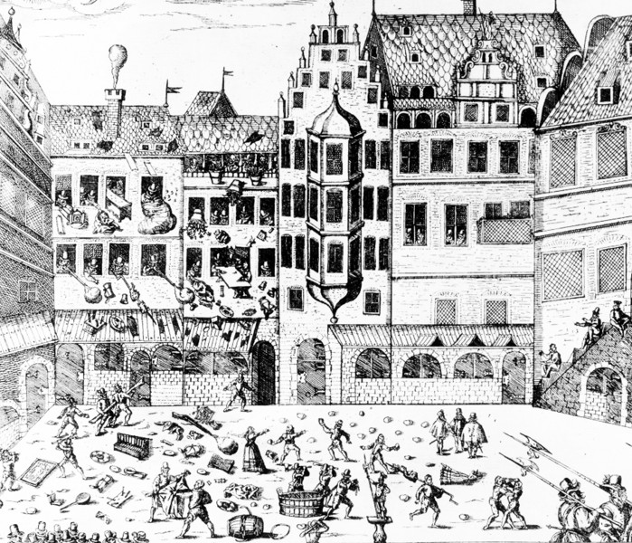 Sturm auf das Haus eines wohlhabenden Kaufmanns während des so genannten Leipziger Calvinistensturms im Mai 1593.